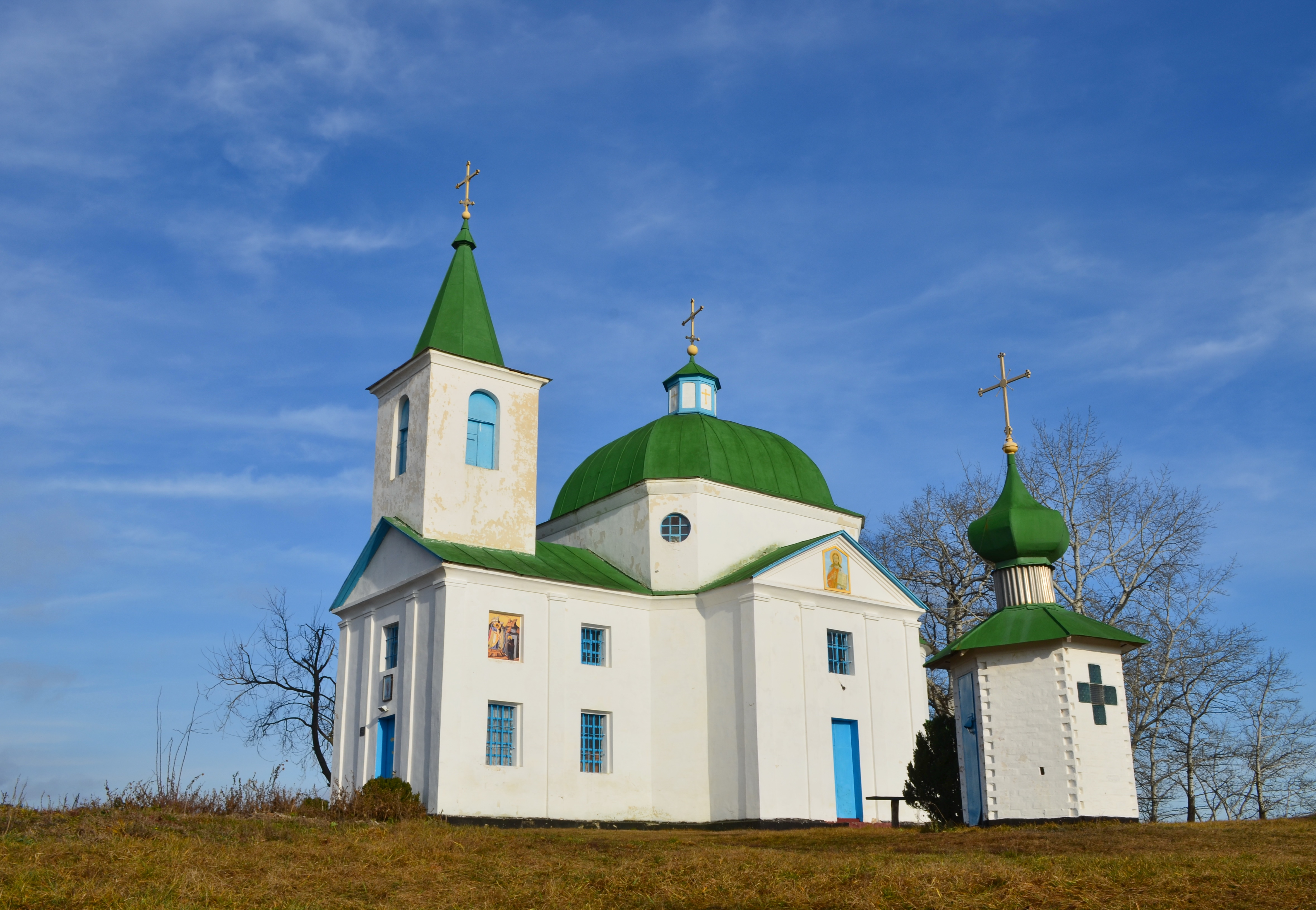 Михайлівська церква (мур.), село Шандра